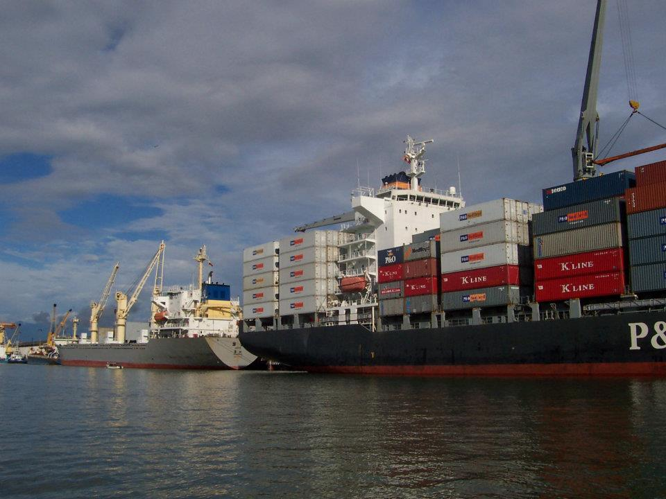 Barcos de carga llegando al puerto de Buenaventura